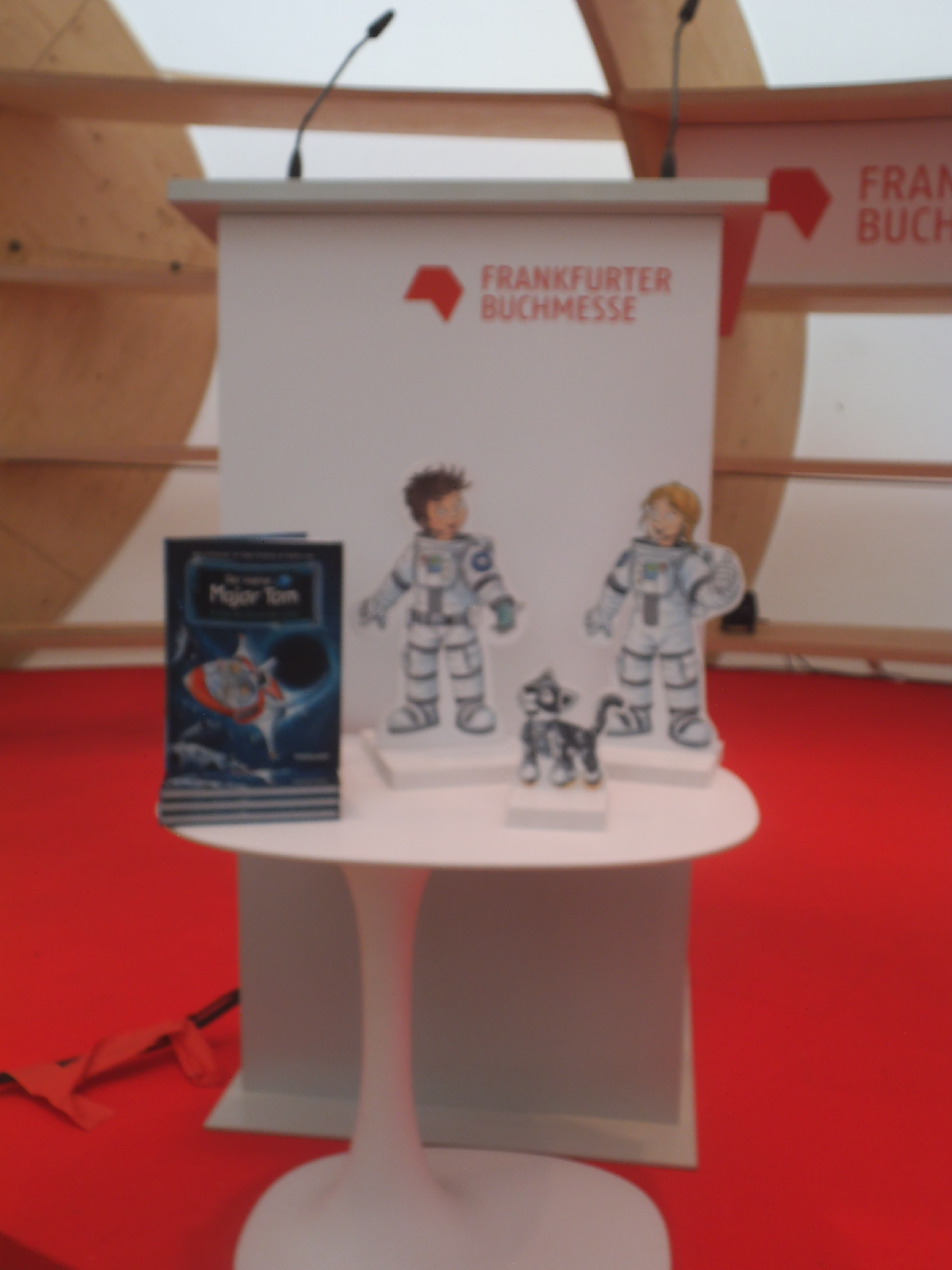 Band 10 der Reihe "Der kleine Major Tom" mit dem Titel "Im Sog des schwarzen Lochs". Präsentation bei einer Lesung von Bernd Flessner auf der Frankfurter Buchmesse 2019.